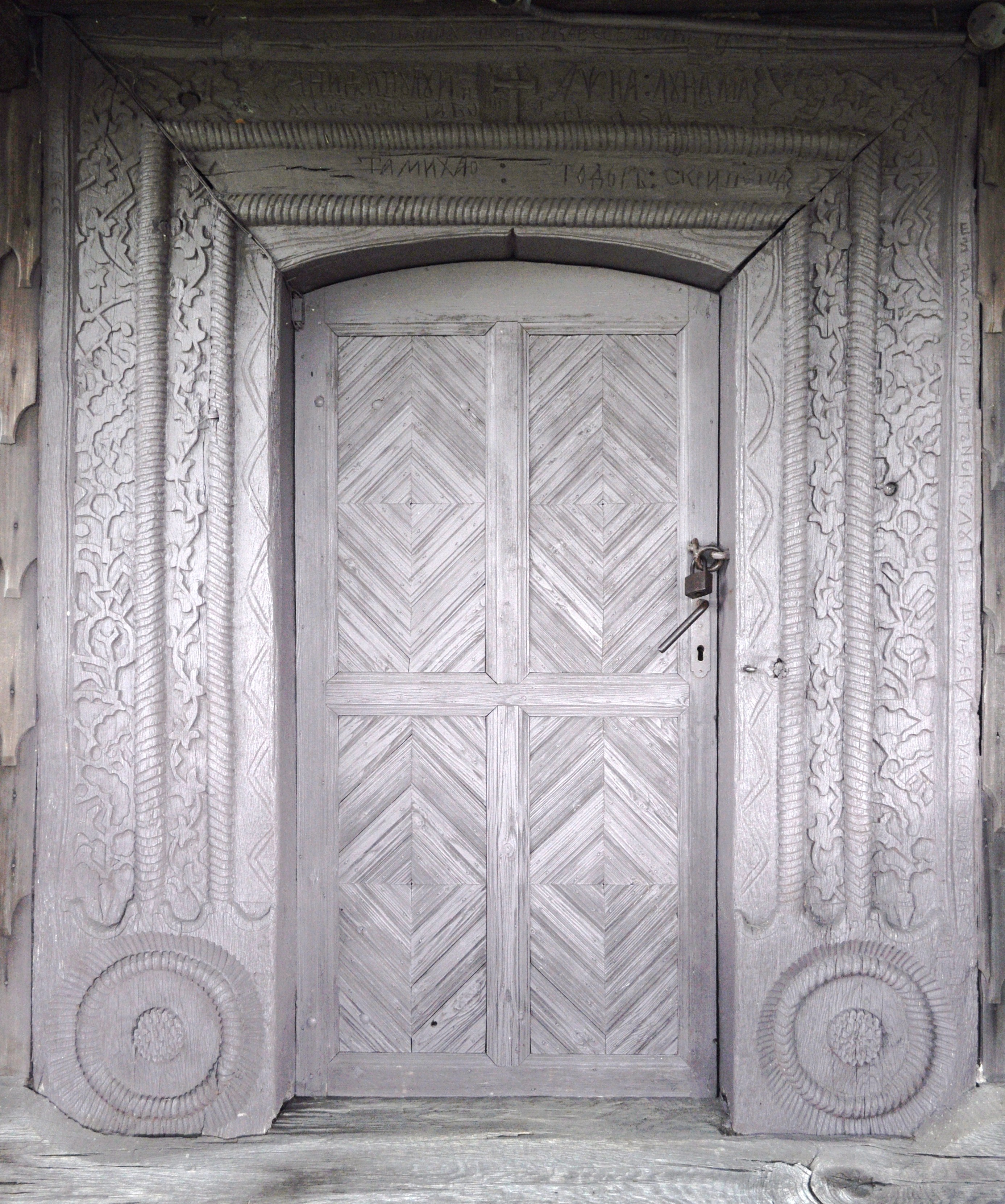 Detaliile portalului, Biserica de lemn „Înălțarea Sfintei Cruci” din Bălcești, județul Cluj